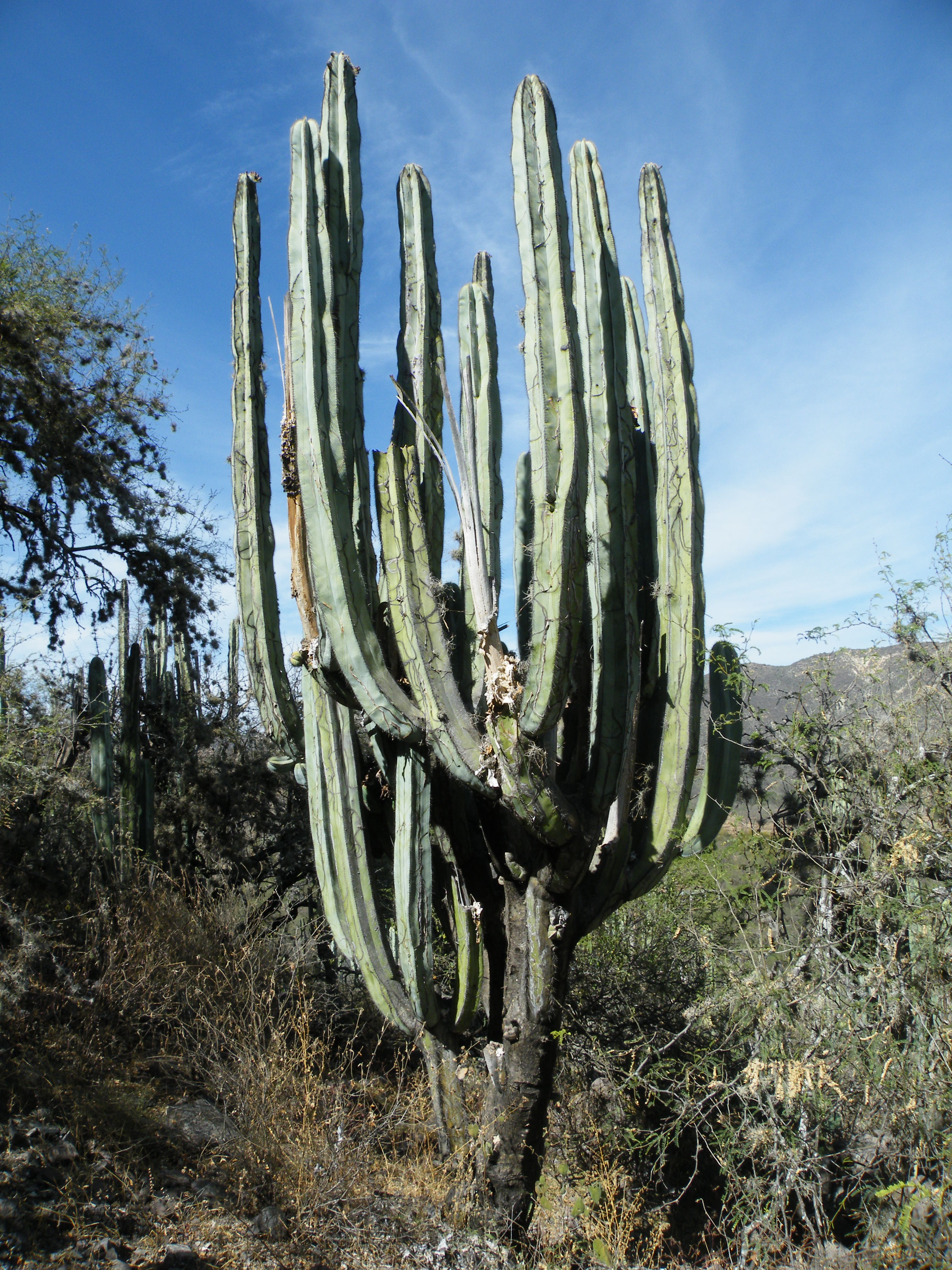 Near Rio Venados, Hidalgo